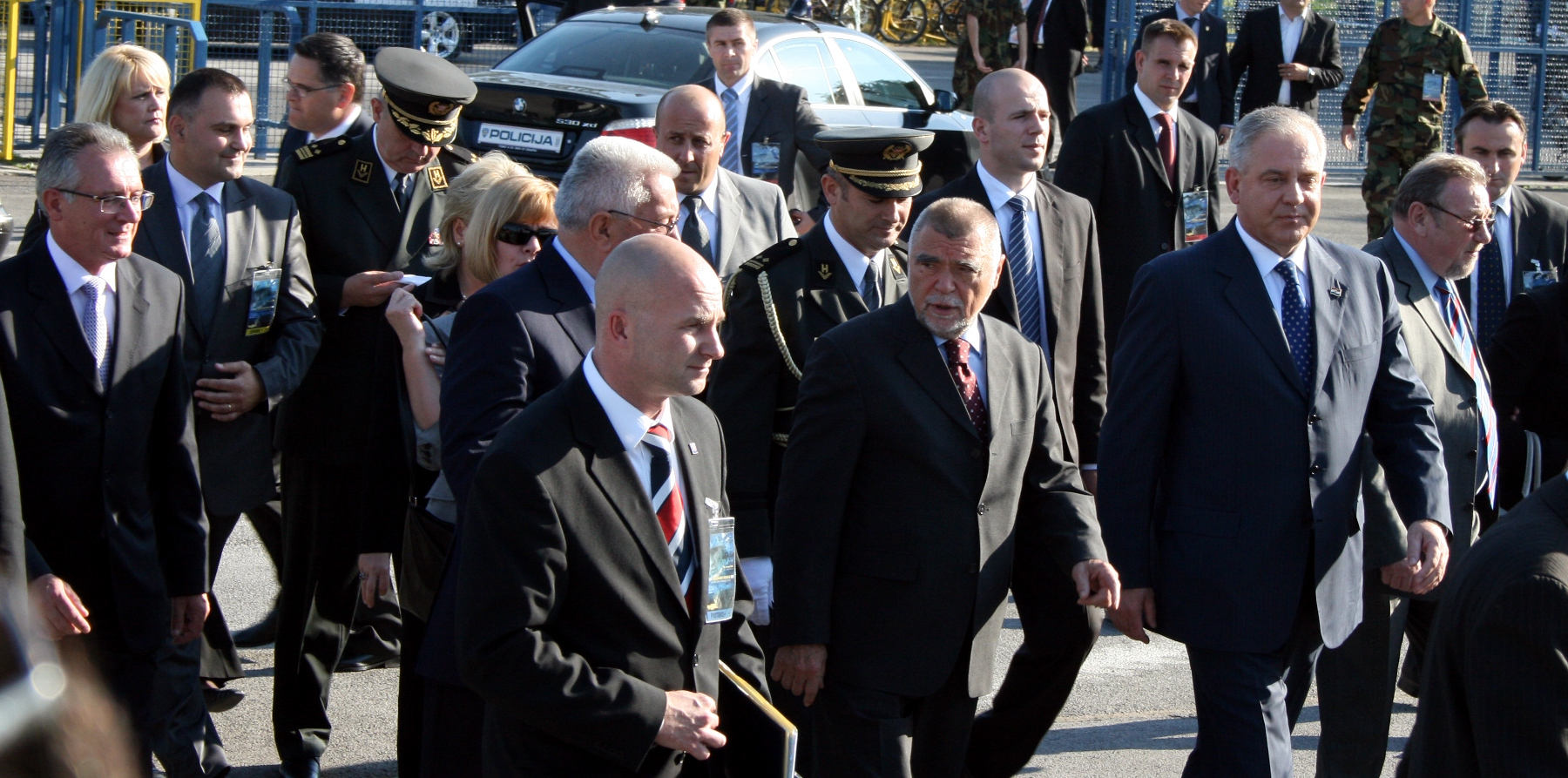 Osamnaesta obljetnica Oružanih snaga RH i Hrvatske kopnene vojske. Središnja proslava održana je u Karlovcu.